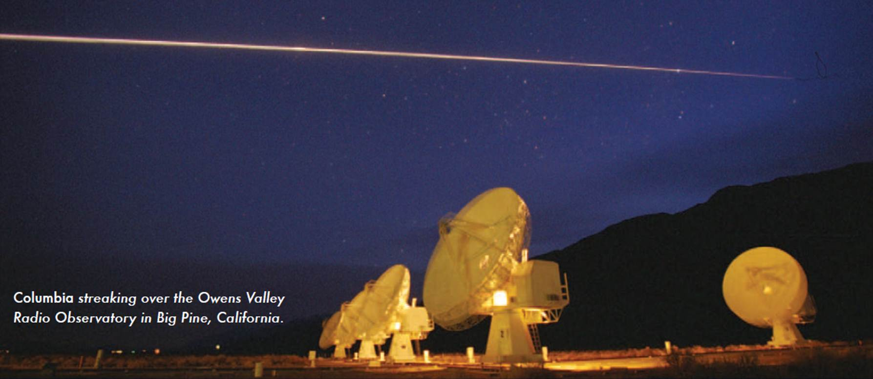 Navette Columbia traversant le ciel de Californie au dessus du radio-télescope de Big Pine. Mission STS-107